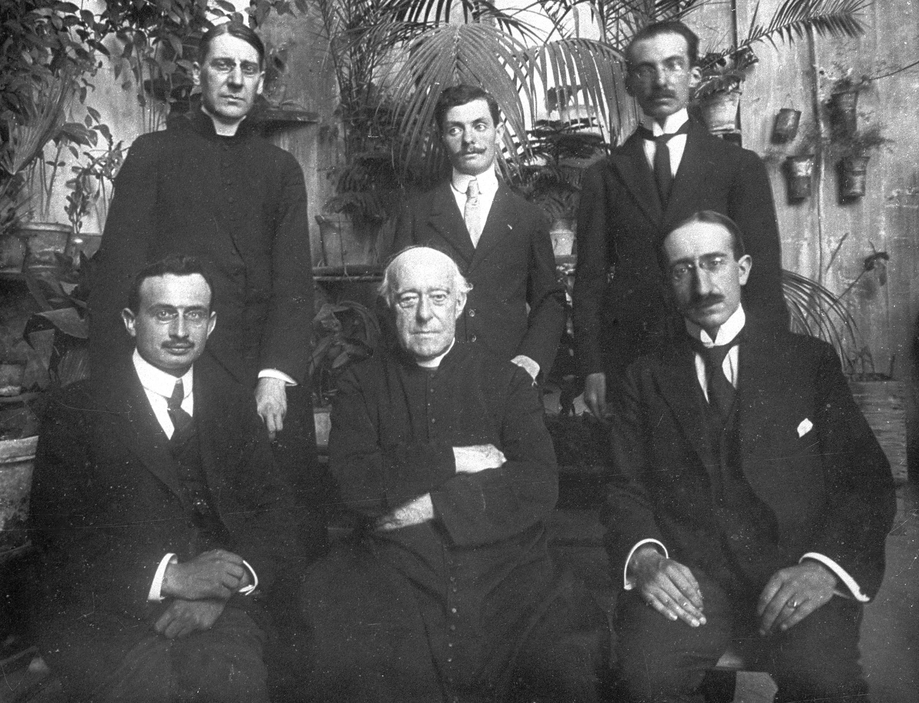 De haut en bas, de droite à gauche : à l'école française de Rome : le futur Monseigneur Joseph Roserot de Melin, Raymond Thouvenot, Emile-Guillaume Léonard, Jean Bayet, Monseigneur Louis Duchesne, Barthélémy-Amédée Pocquet du Haut-Jussé. Promotion 1919-1920. Photographie anonyme, daté de 1919-1920.